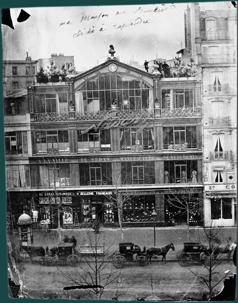 Atelier de Gustave Le Gray au 35, boulevard des Capucines.